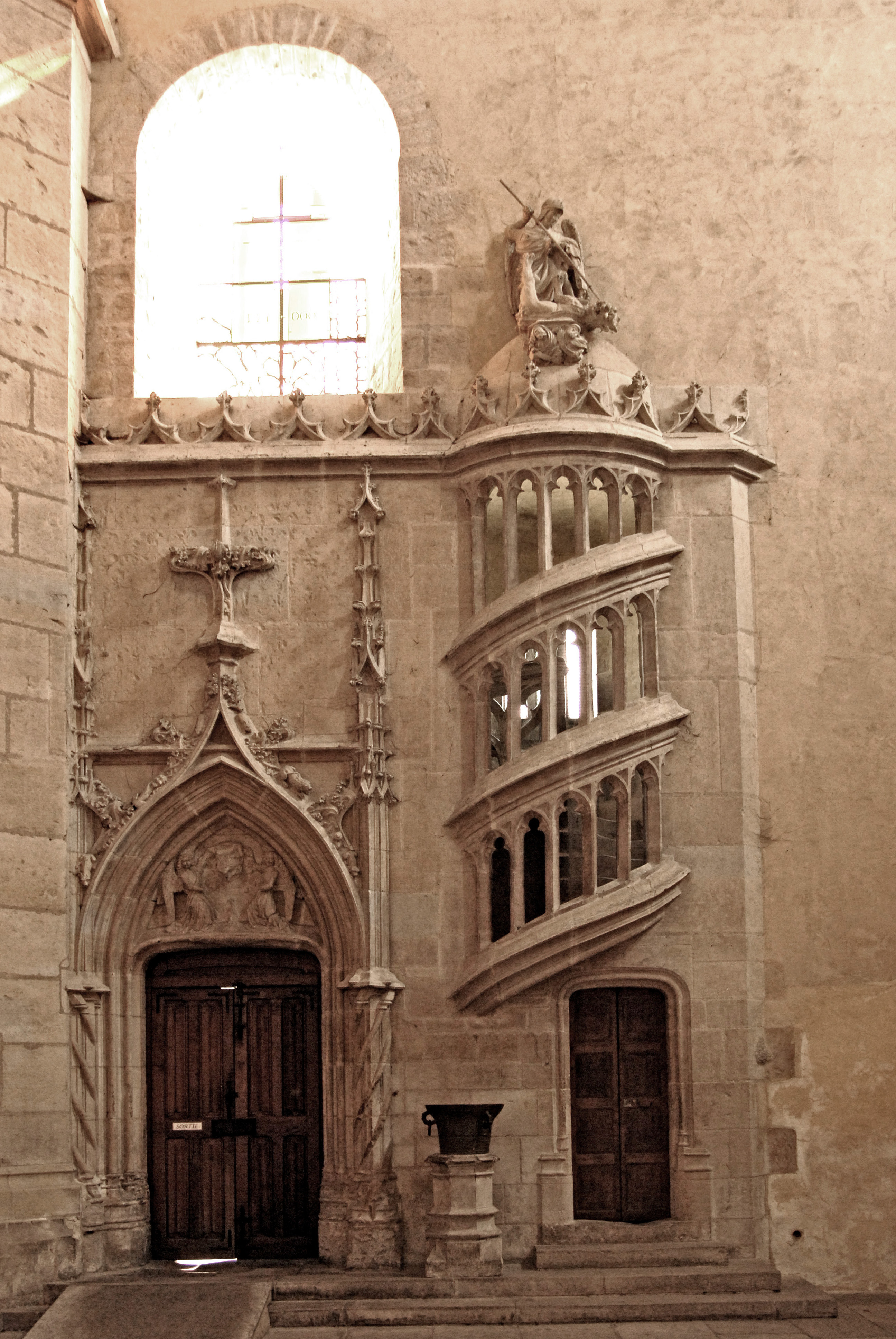 Kathedrale Nevers, Südwand Querhaus